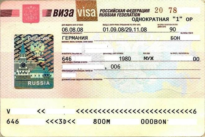 Russian Visa